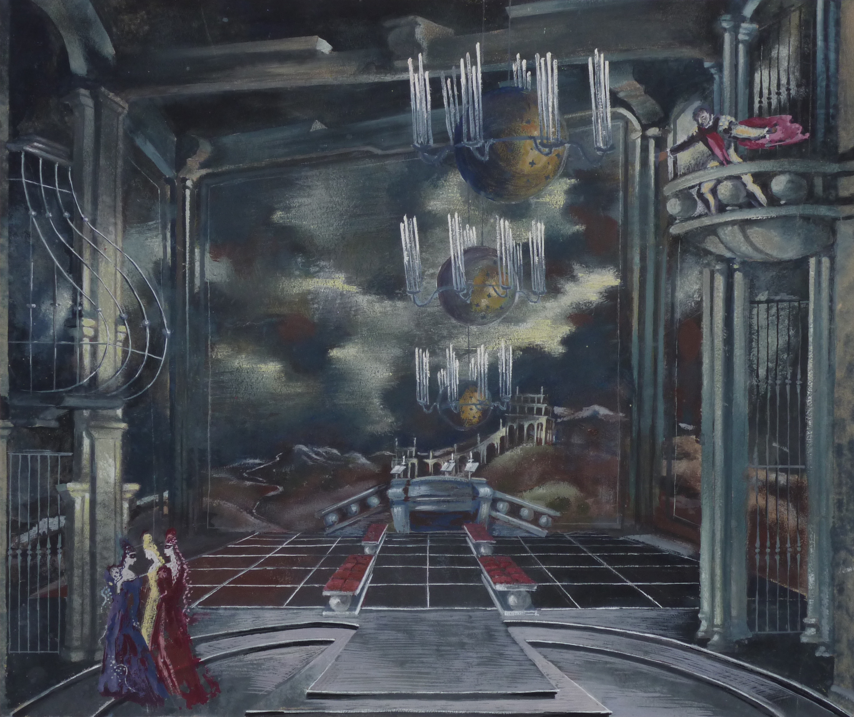 Bühnenbildentwurf von Helmut Jürgens für "Don Giovanni" von W. A. Mozart, 1. Akt, Aufführung München 1949